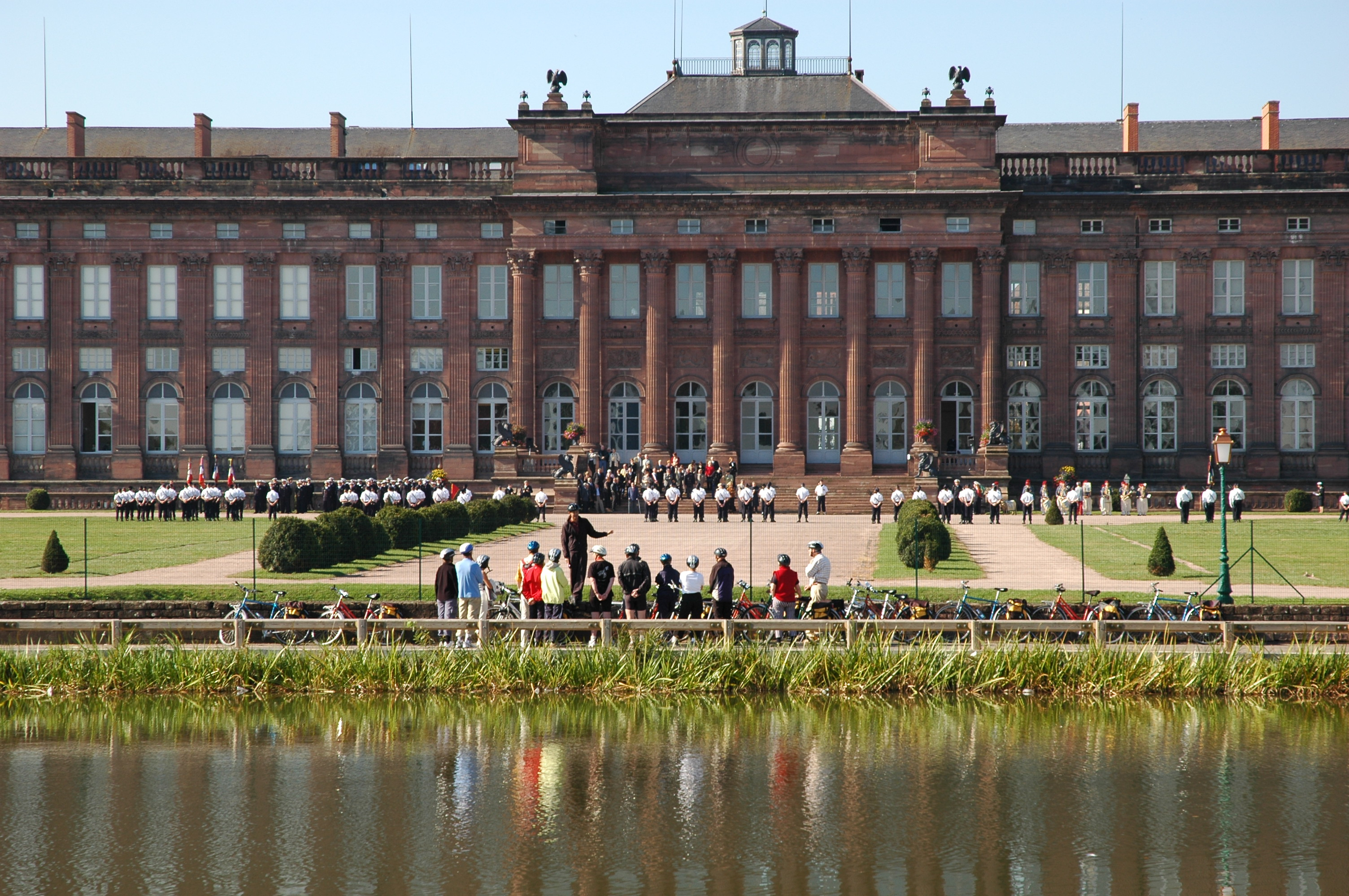 Chateau des Rohan à Saverne